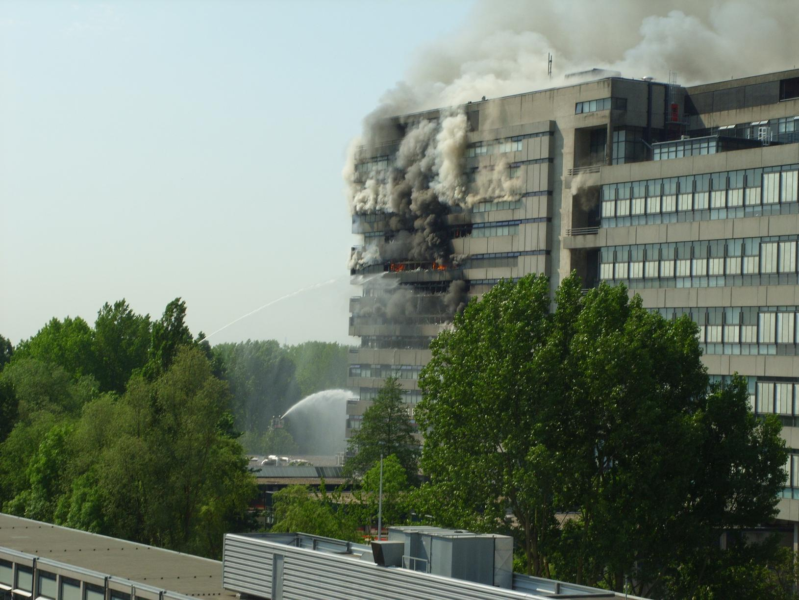 Brand in een gebouw van de faculteit Bouwkunde van de Technische Universiteit Delft